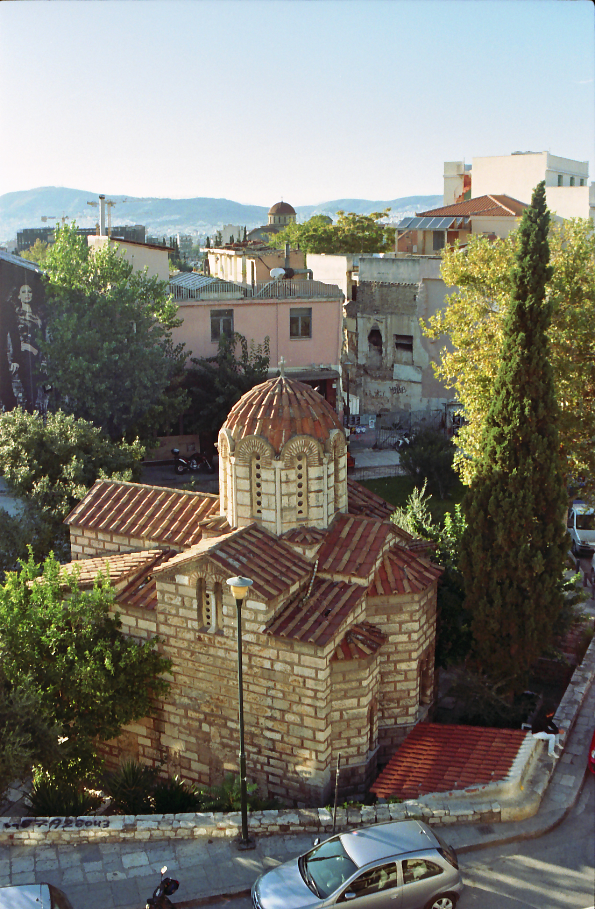 Ναός Αγίων Ασωμάτων, Αθήνα«Ναός Αγίων Ασωμάτων, Αθήνα»